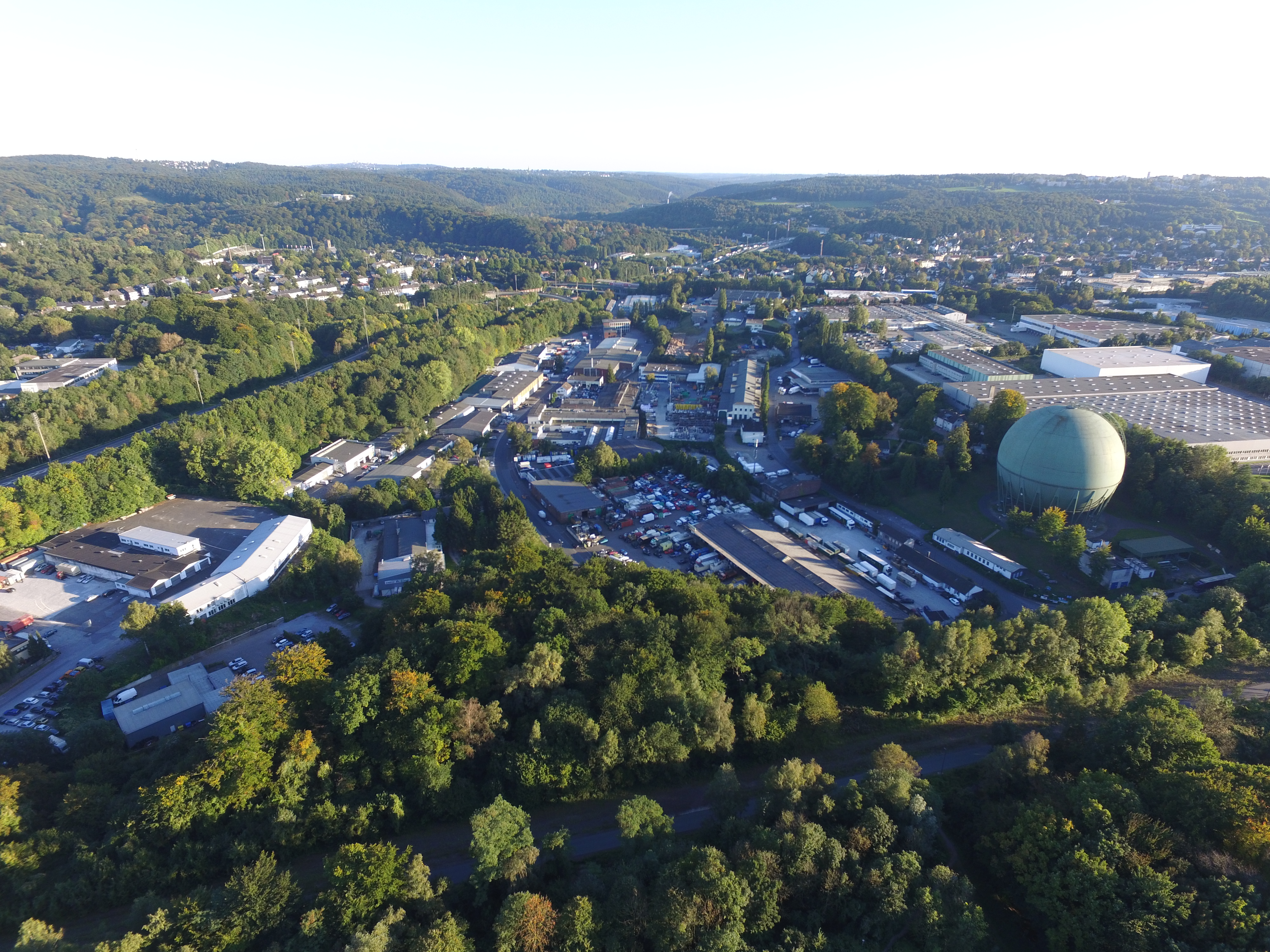 Wuppertaler Quartier Industriestraße, Gasbehälter Möbeck, Sonnborner Kalksenke